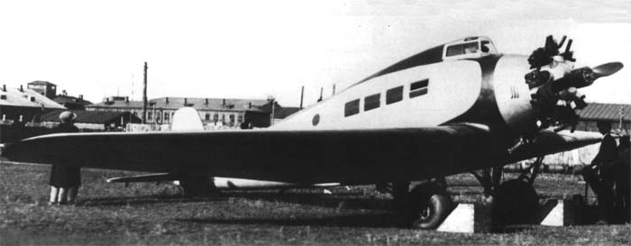 Самолёт ХАИ-1 перед первым вылетом.